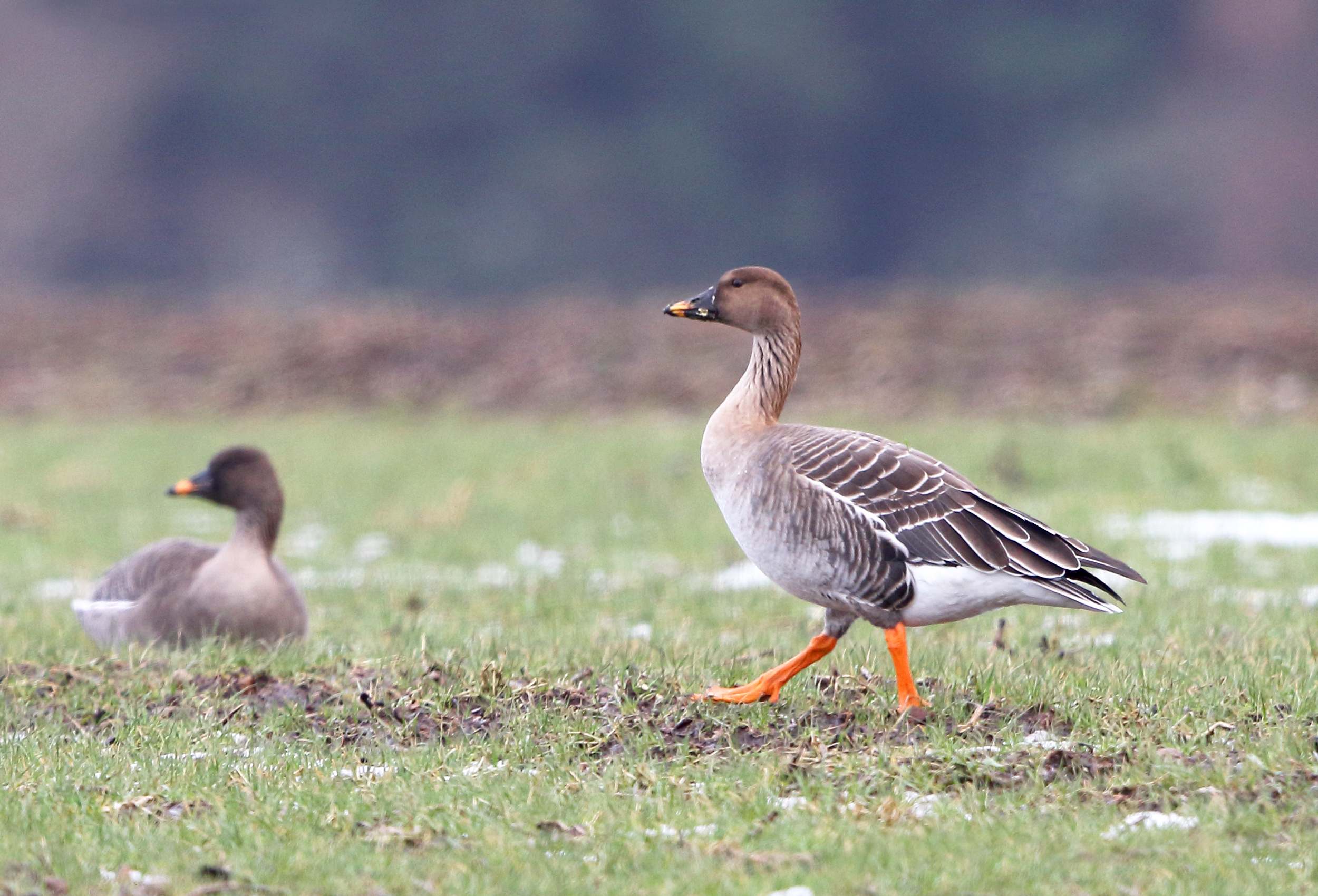 Rietgans